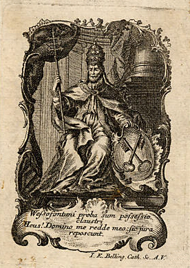 Ex Libris für Kloster Wessobrunn, Kupferstich von J. E. Belling (Augsburg) ca. 1720, Größe: 10 x 7 cm